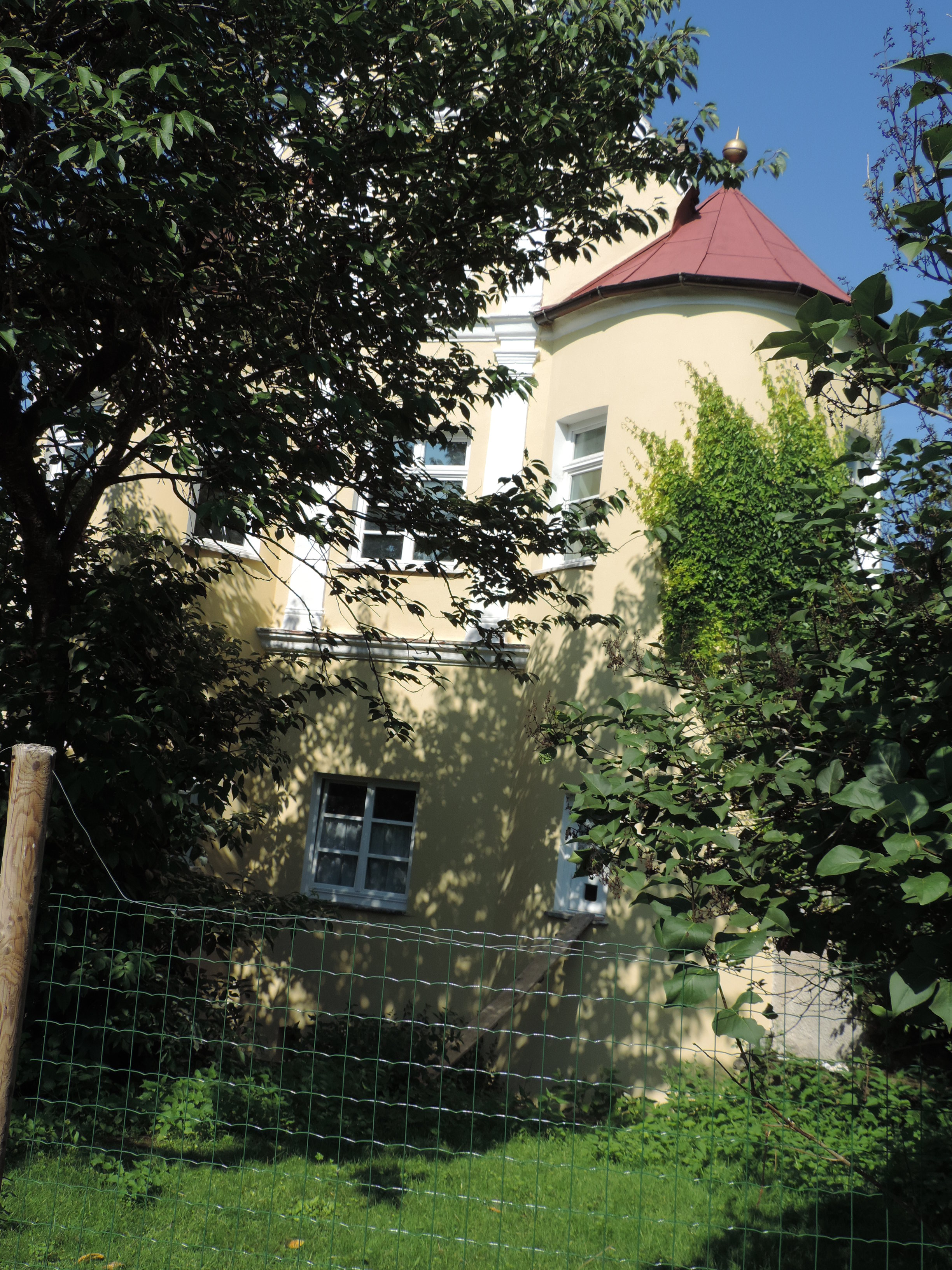 Ostfront Schloss Eglingen